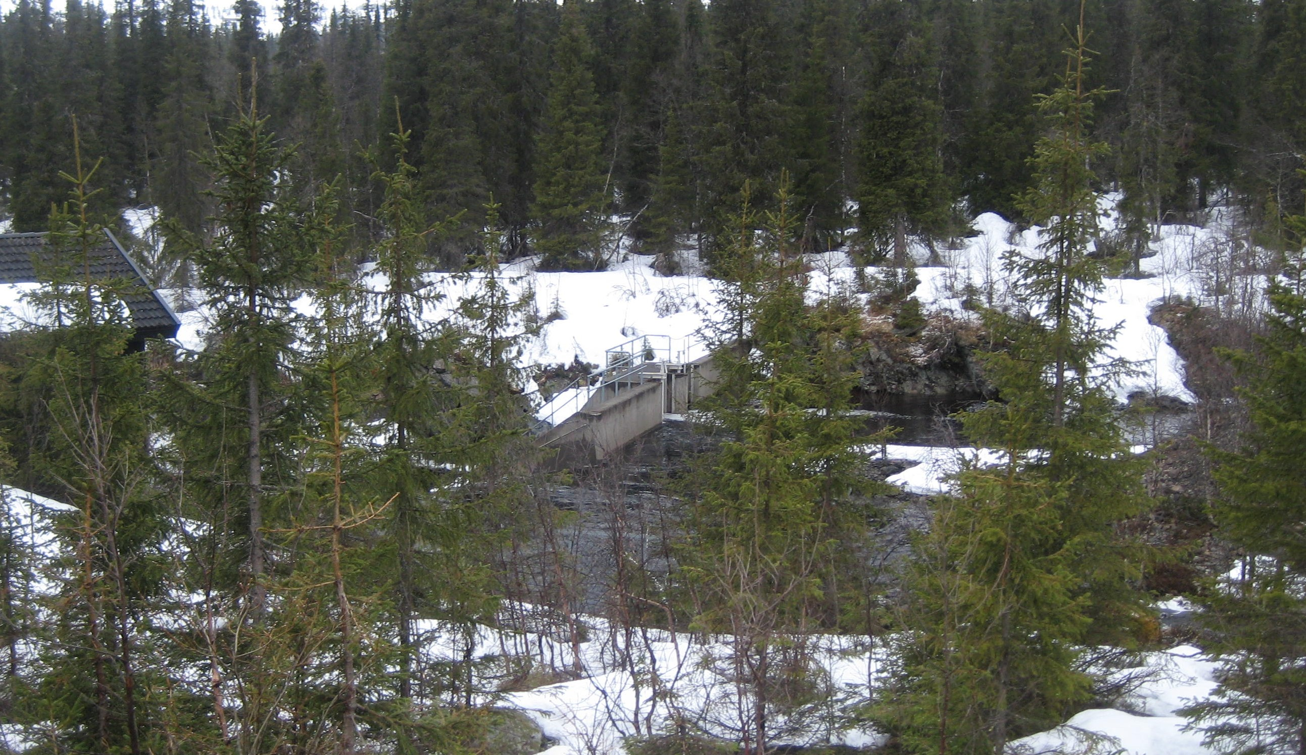 Inntakdammen til Dokkfløy